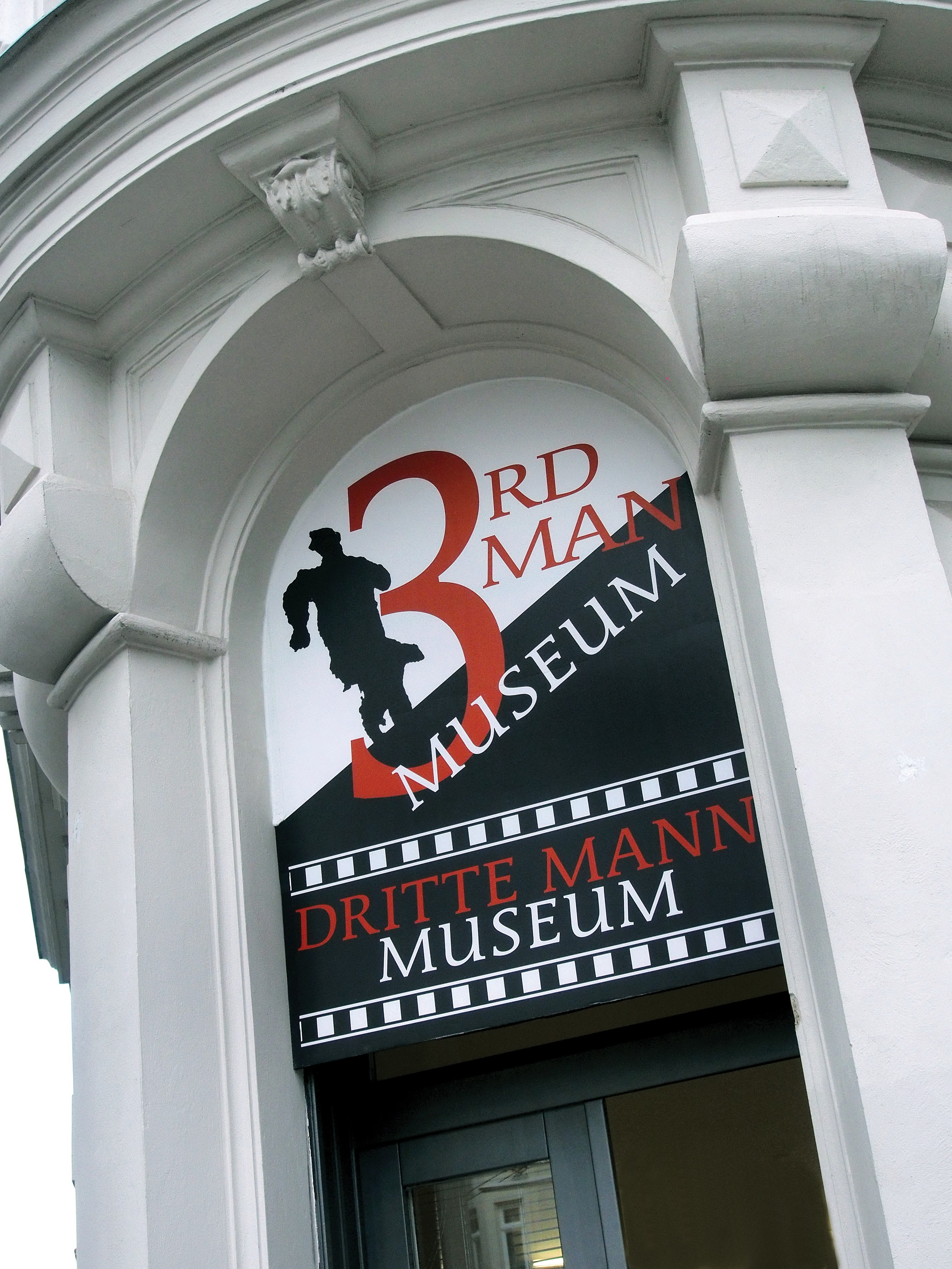 Dritte Mann Museum Wien (Gemeindebezirk Wieden, Eingang Ecke Mühlgasse / Pressgasse)